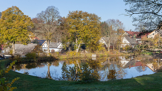 Dolní rybník v Ubušíně.